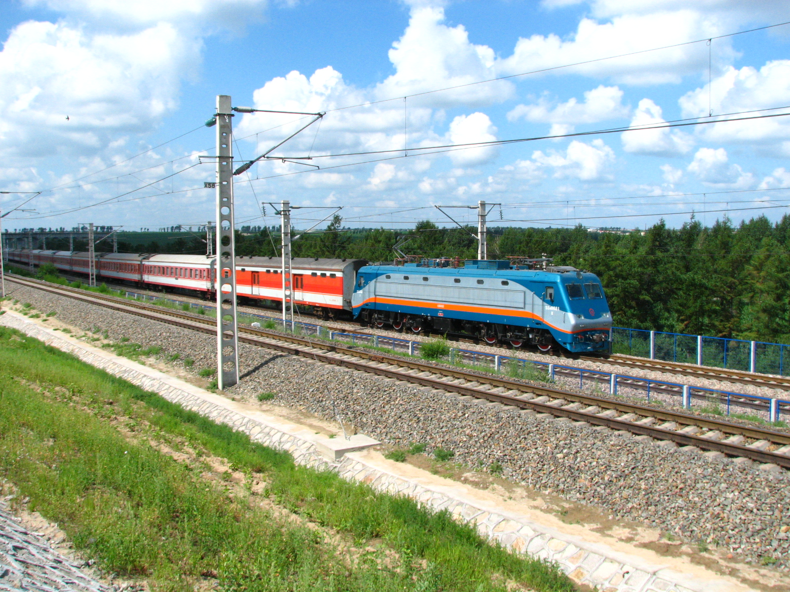 巡道工出品 photo by Xundaogong 1521次通过